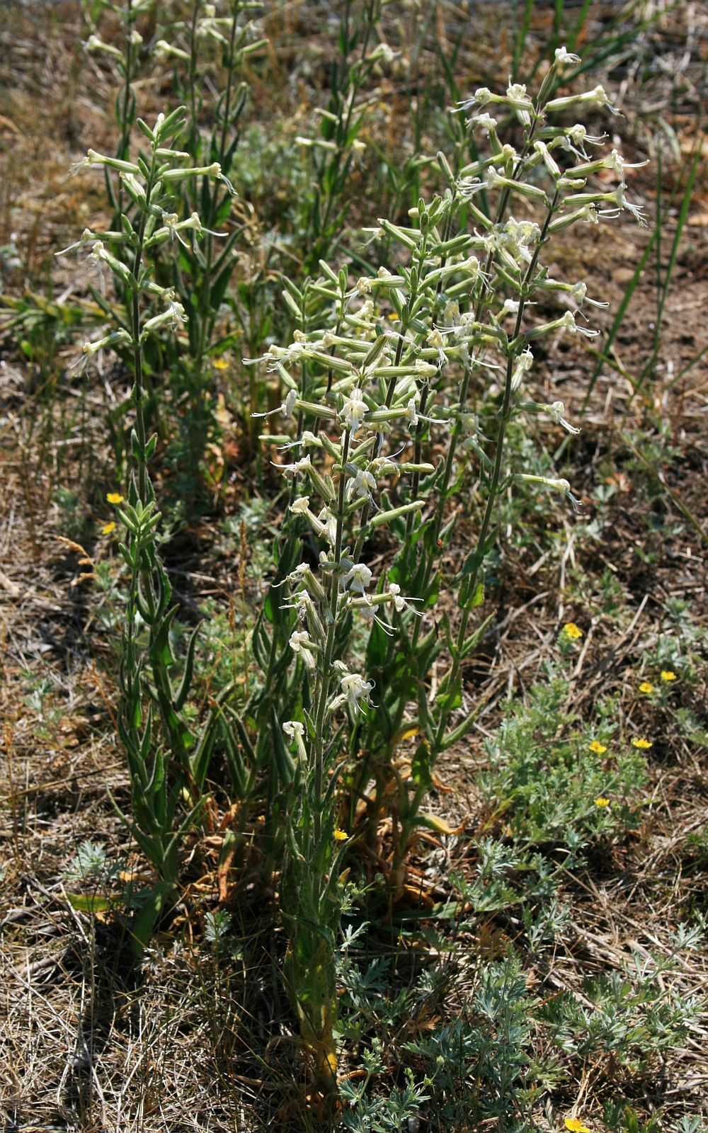 Kleb-Leimkraut (Silene viscosa), Nelkengewächse (Caryophyllaceae) – Österreich/Austria/Autriche: Niederösterreich, Marchtal, „In den Sandbergen“ ESE Waltersdorf an der March